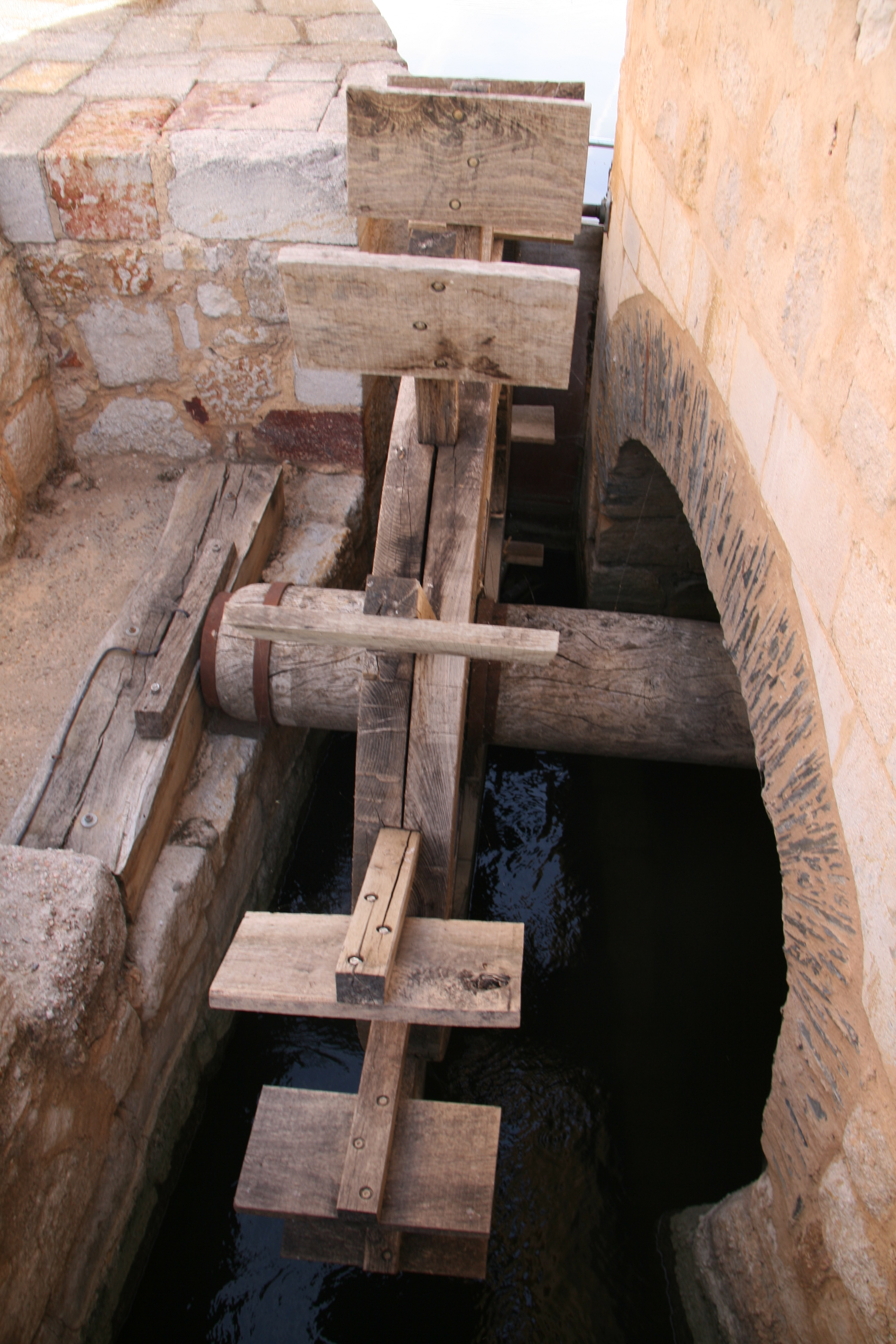 Aceñas de Olivares (Zamora) - Paletas